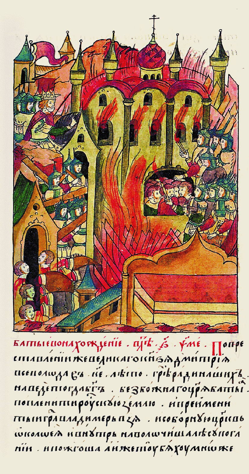 Батыево нашествие в 6745 году. На 25 год после преставления великого князя Дмитрия Всеволода за грехи наши навел Бог безбожного царя Батыя пленить Русскую землю. Взяли они славный город Владимир и соборную церковь, все вокруг нее и внутри обло жили деревом и подожгли. А там было множество [людей, и одни от огня скончались, другие — задохнулись, а остальные были посечены.]